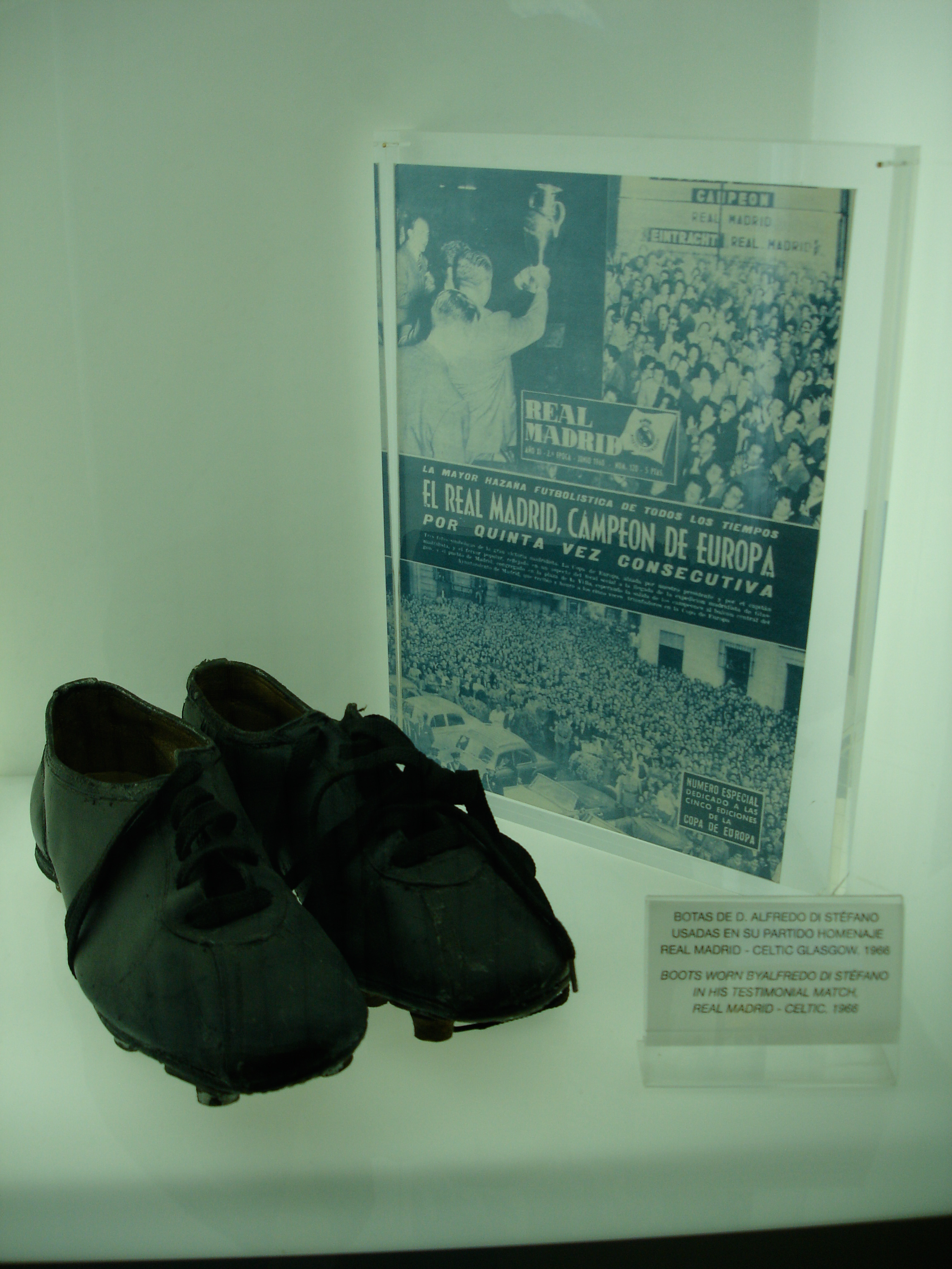 Club memorabilia